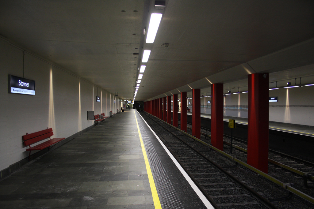 Stovner T-banestasjon fra vestgående plattform mot Oslo Sentrum. Bildet er tatt i billedretning mot Vestli.